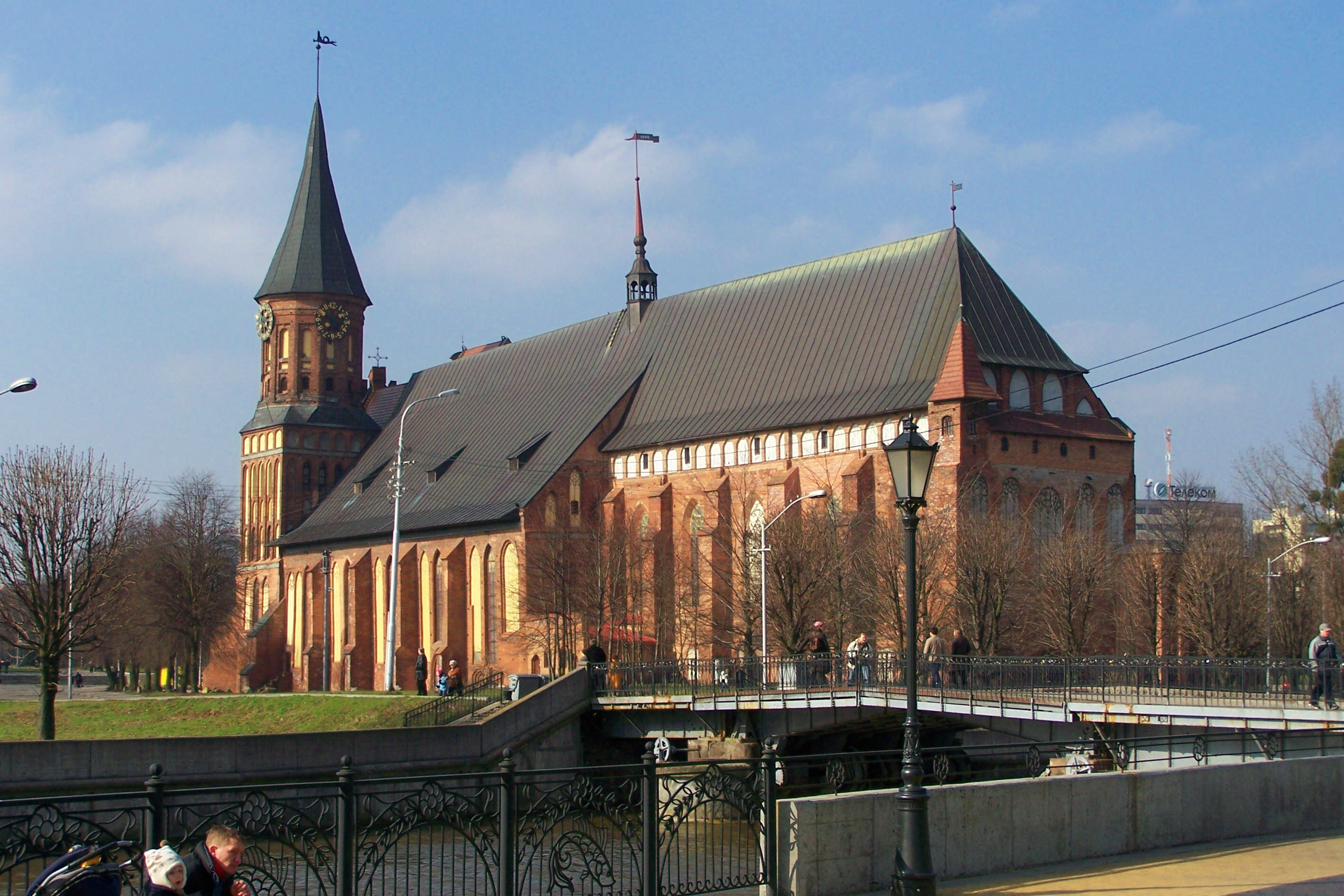 Dom von Kaliningrad